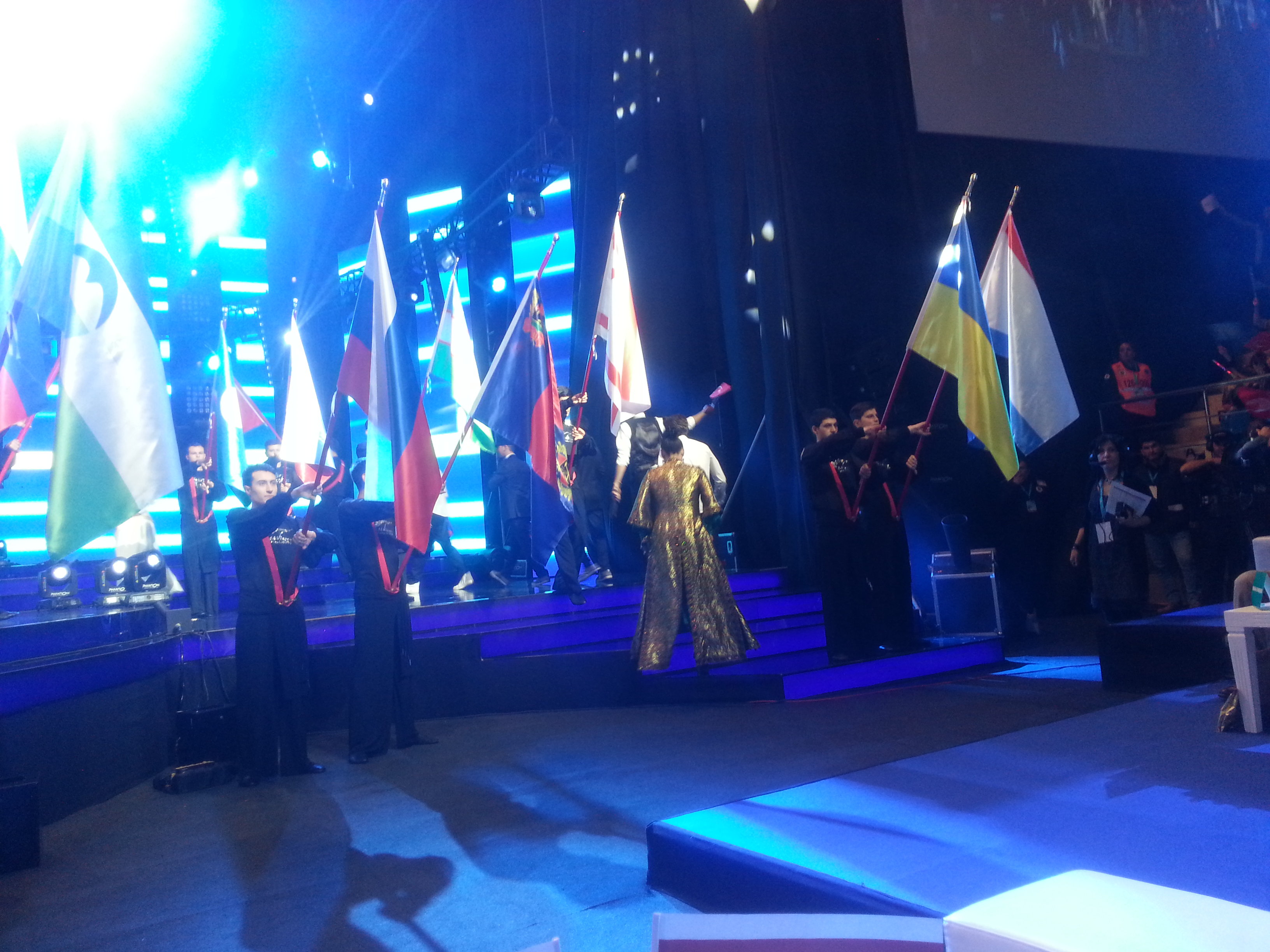 Türkvizyon finalinden görüntüler..